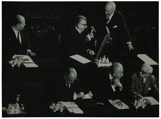 Presentazione alla Camera del Governo Leone I